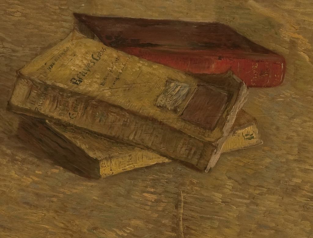 stilleven boeken Vincent van Gogh 1887 - detail